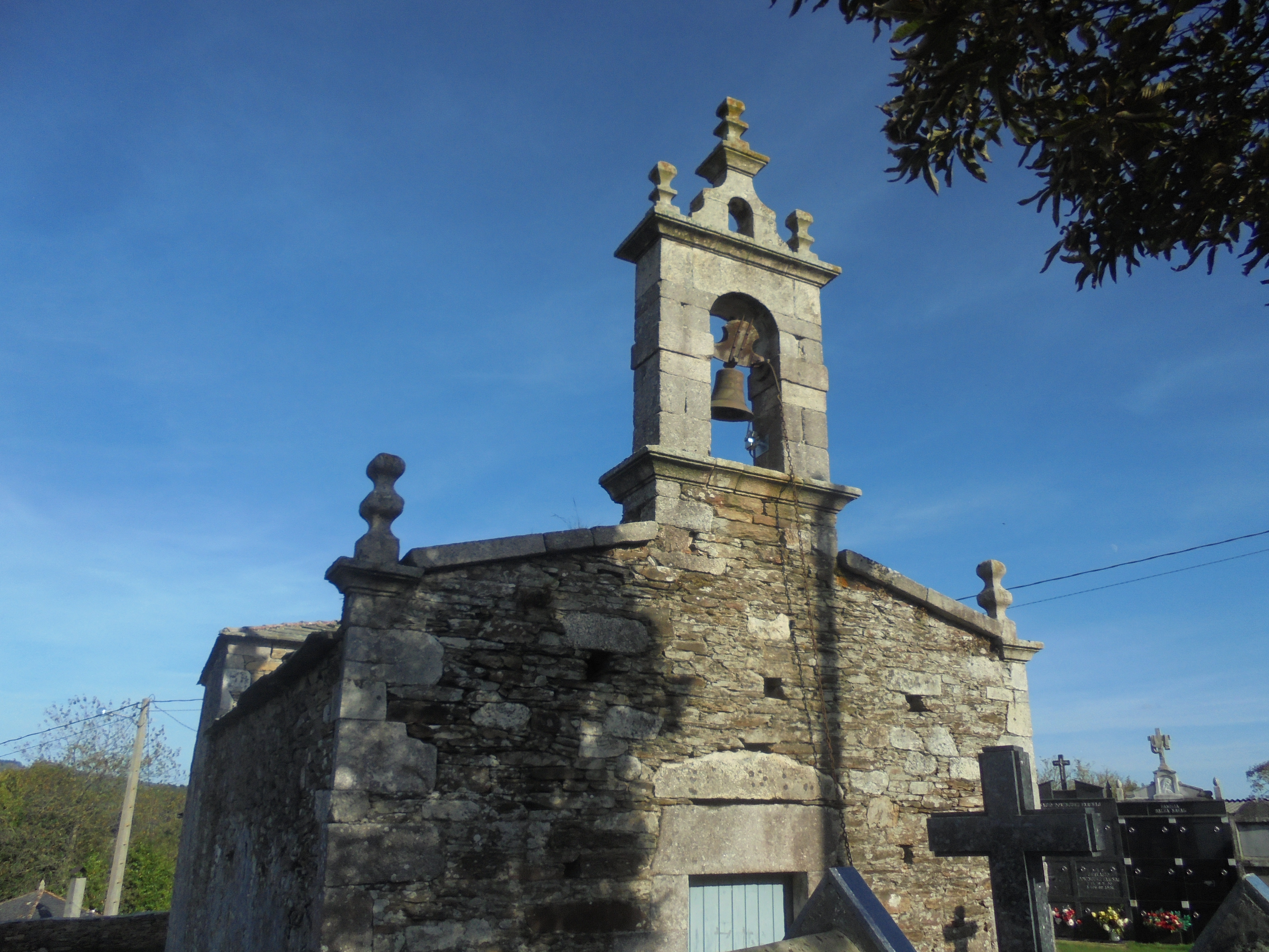 Igrexa parroquial de Carazo ( Pol)